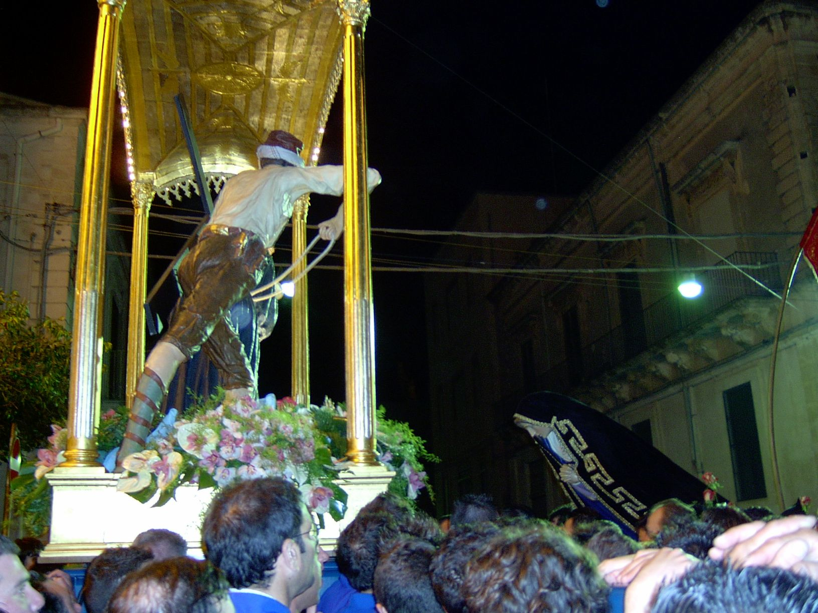 Foto liberamente concessa da E.Moncada e non protetta da copyright